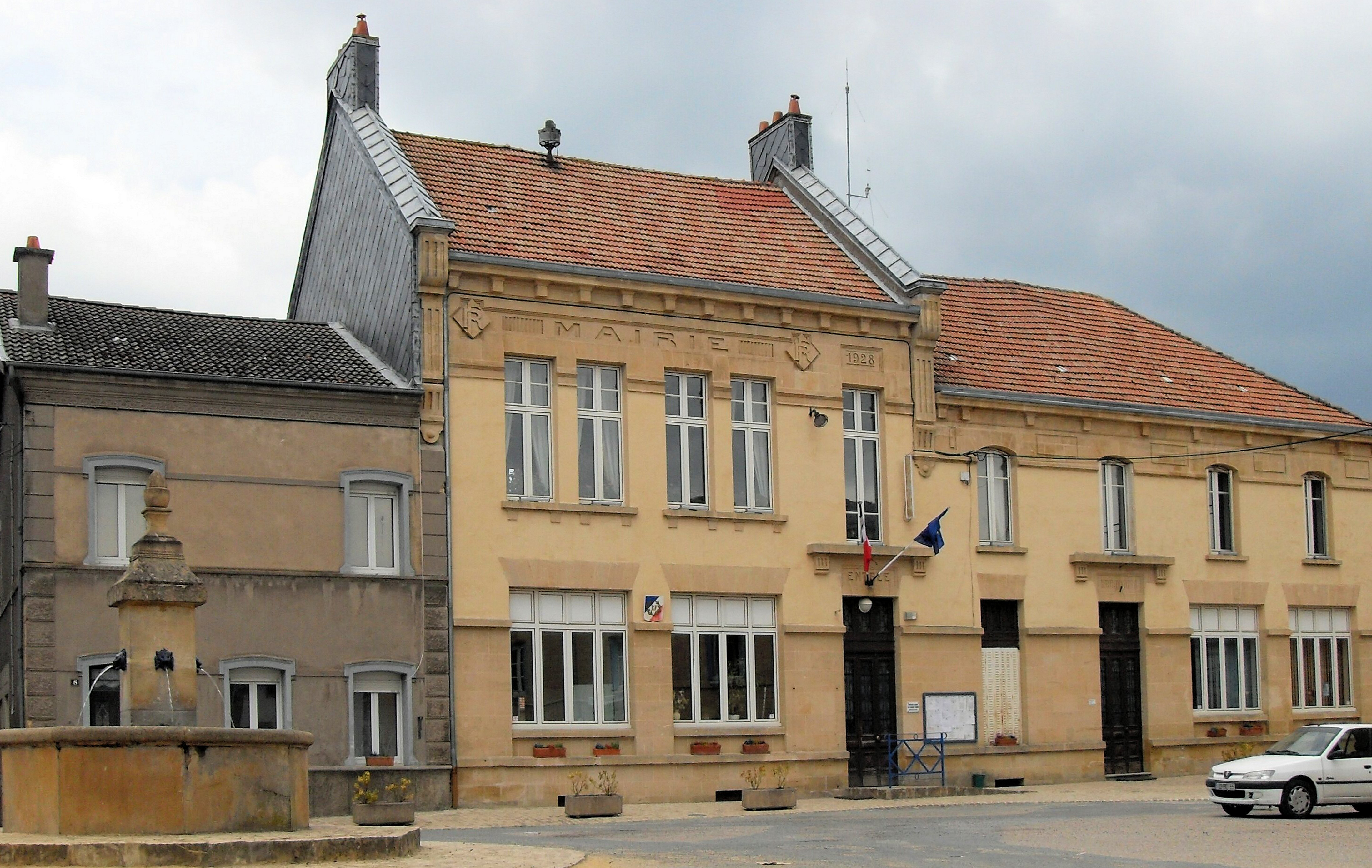 Rathaus in Marville [(Département Meuse, Frankreich).